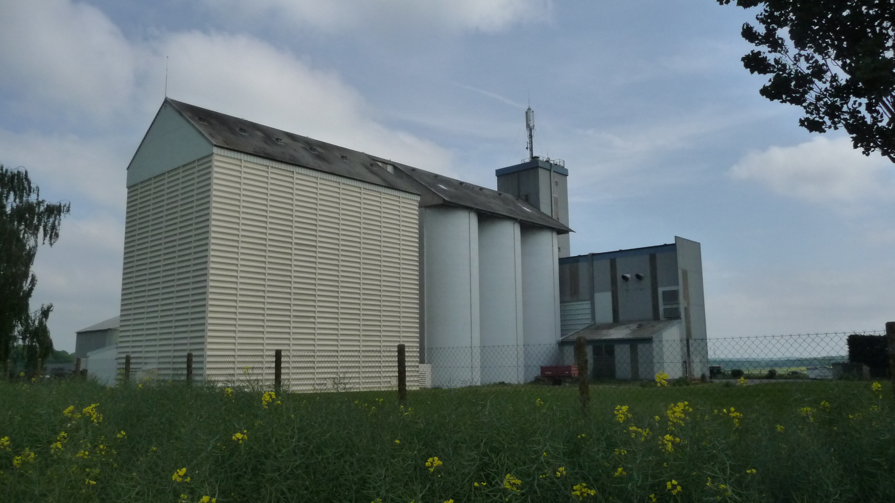 Silo de collecte de la coopérative Sevépi à Hargeville (Yvelines, France)